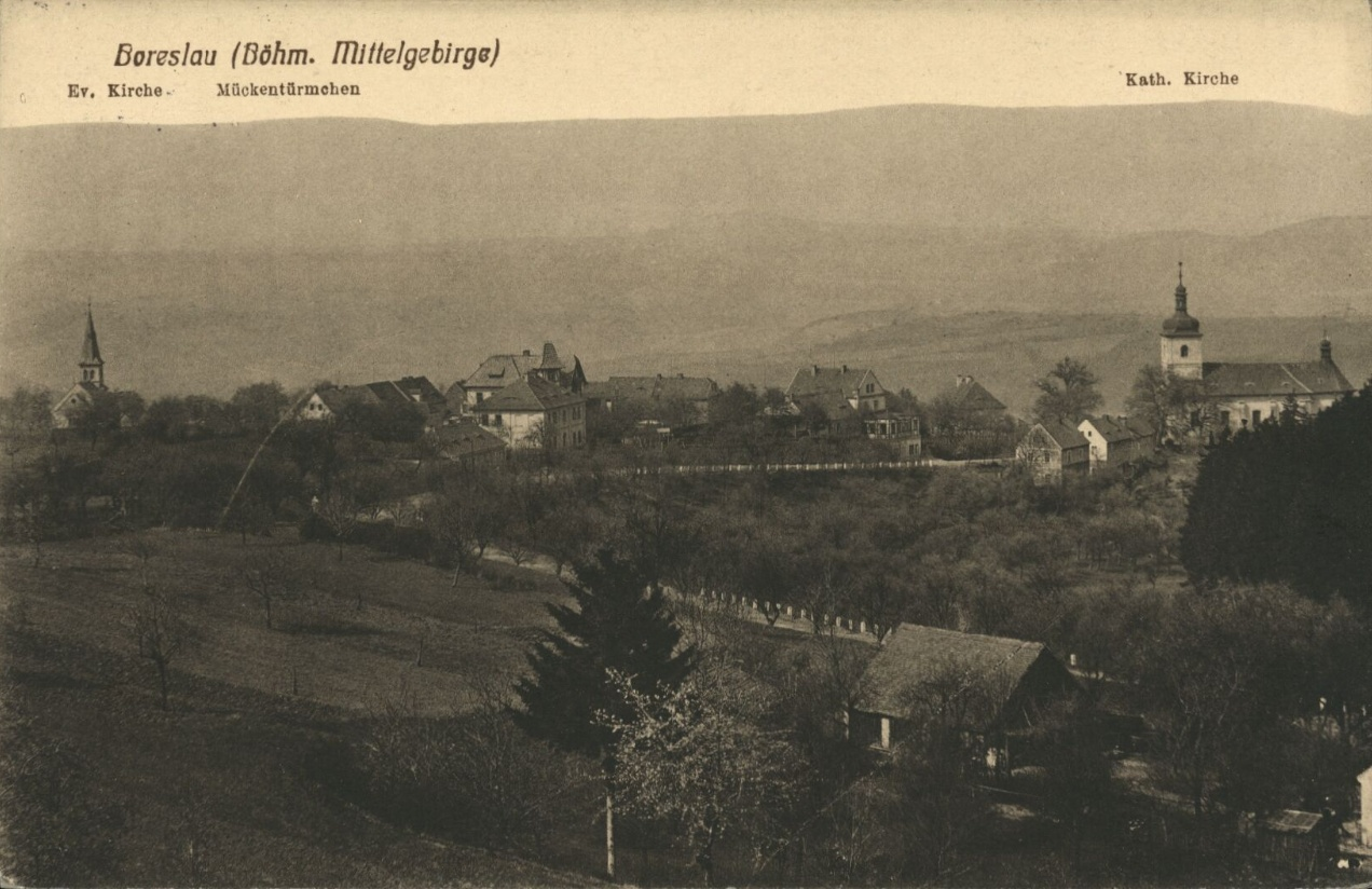 Boreslau (Böhm. Mittelgebirge)